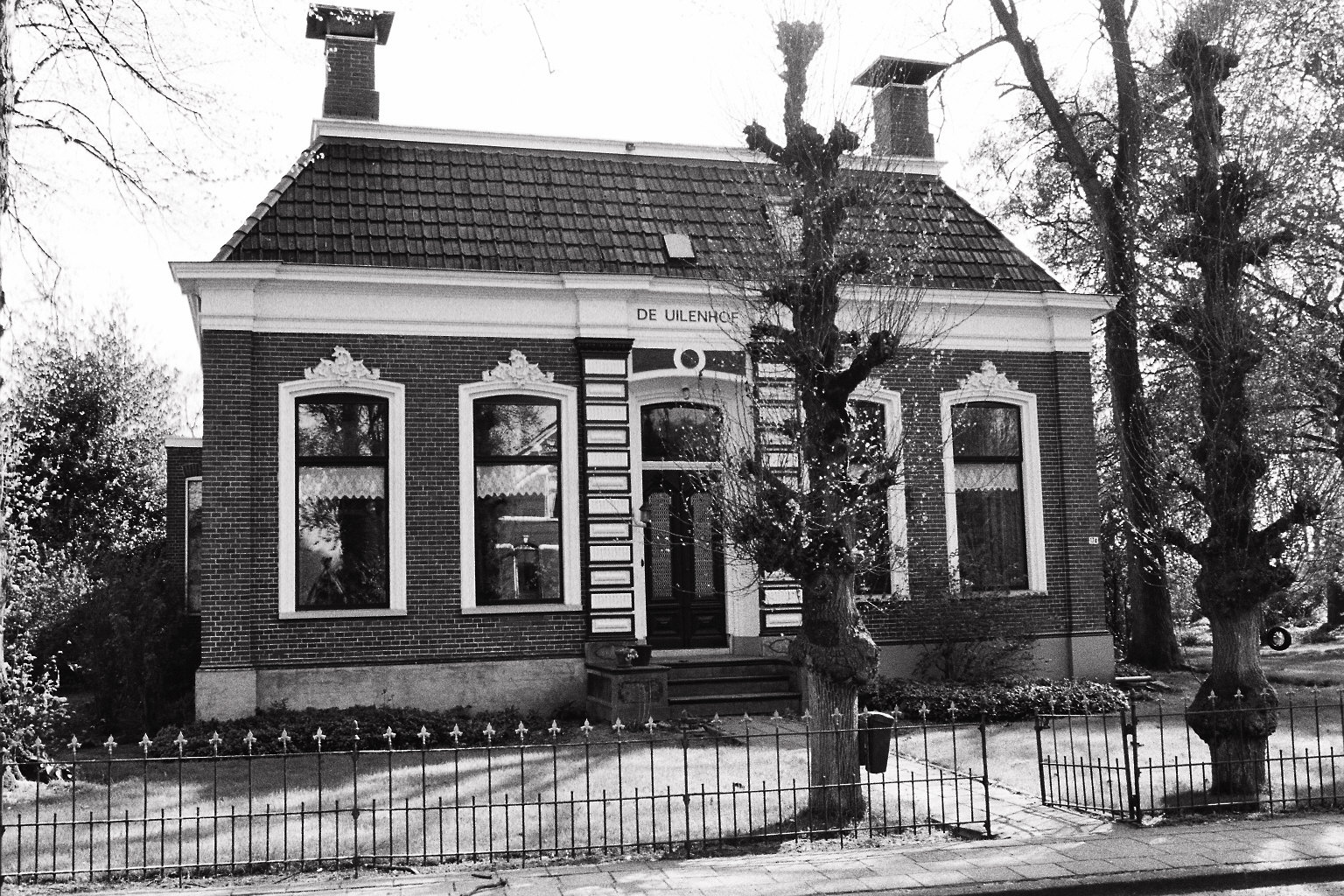 omschrijving: Landhuis te Meeden (Groningen; Nederland. Fotograaf: H. Kruizinga, Zwolle, Nederland Uit eigen privé collectie.